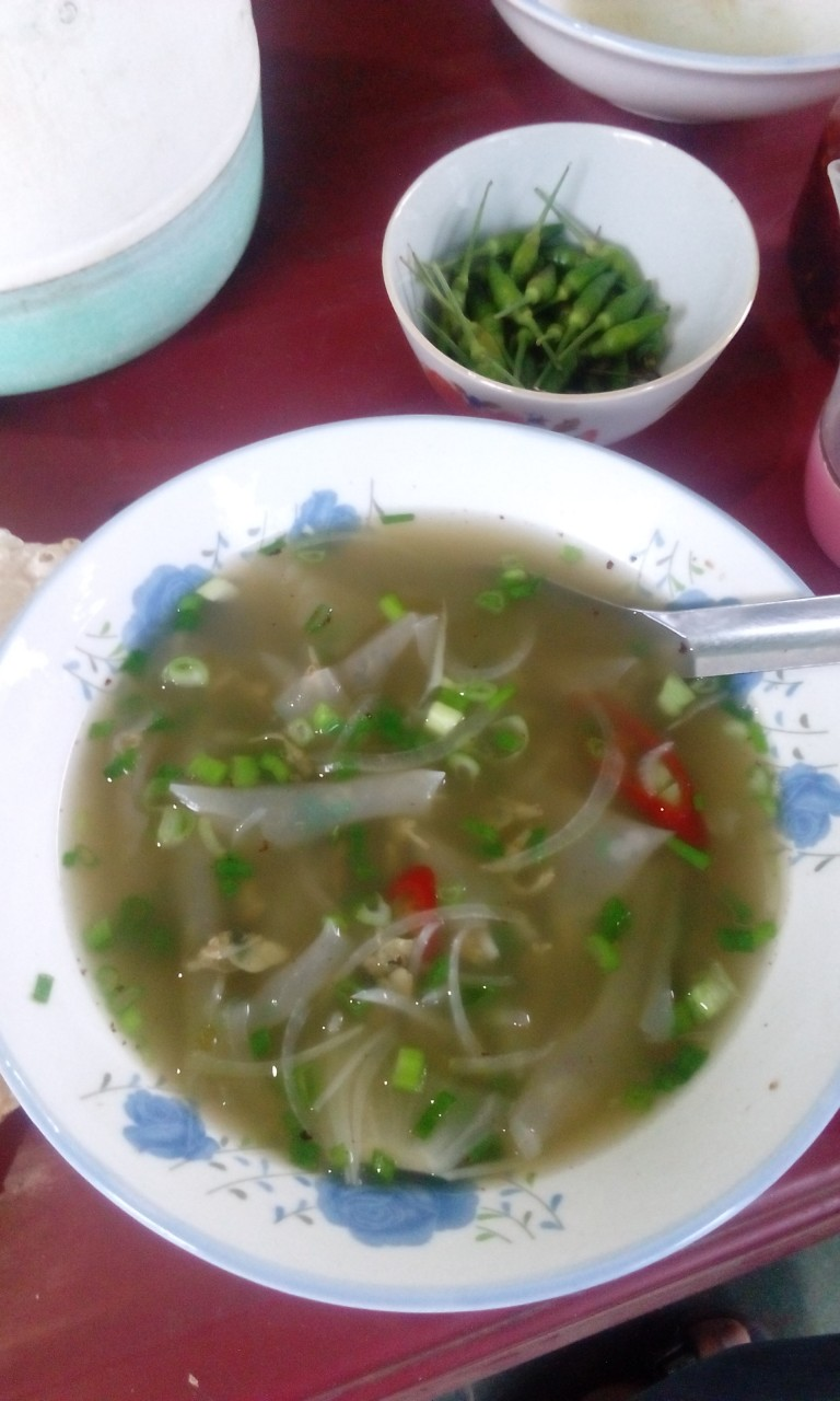 don-mon-an